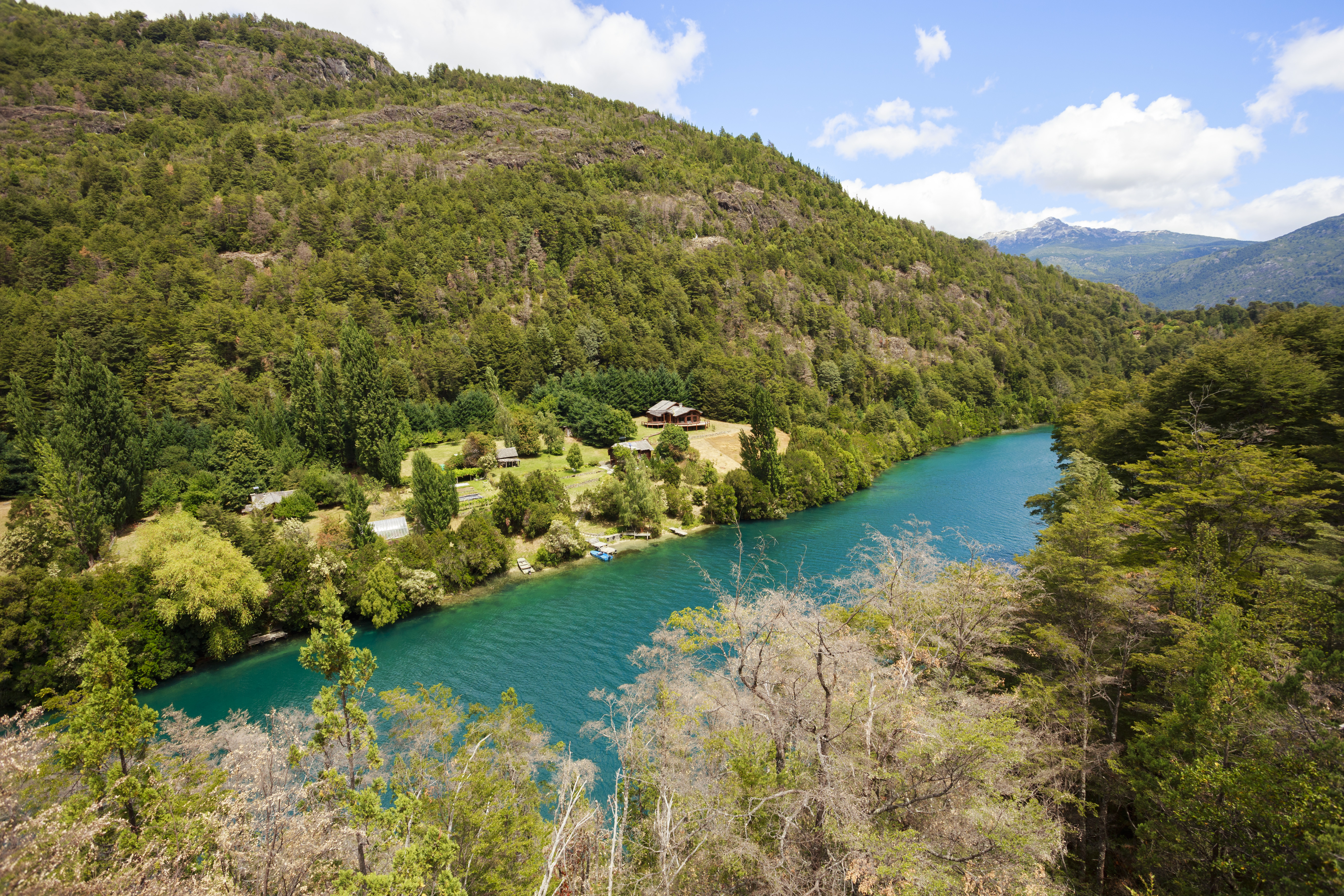 cochamó